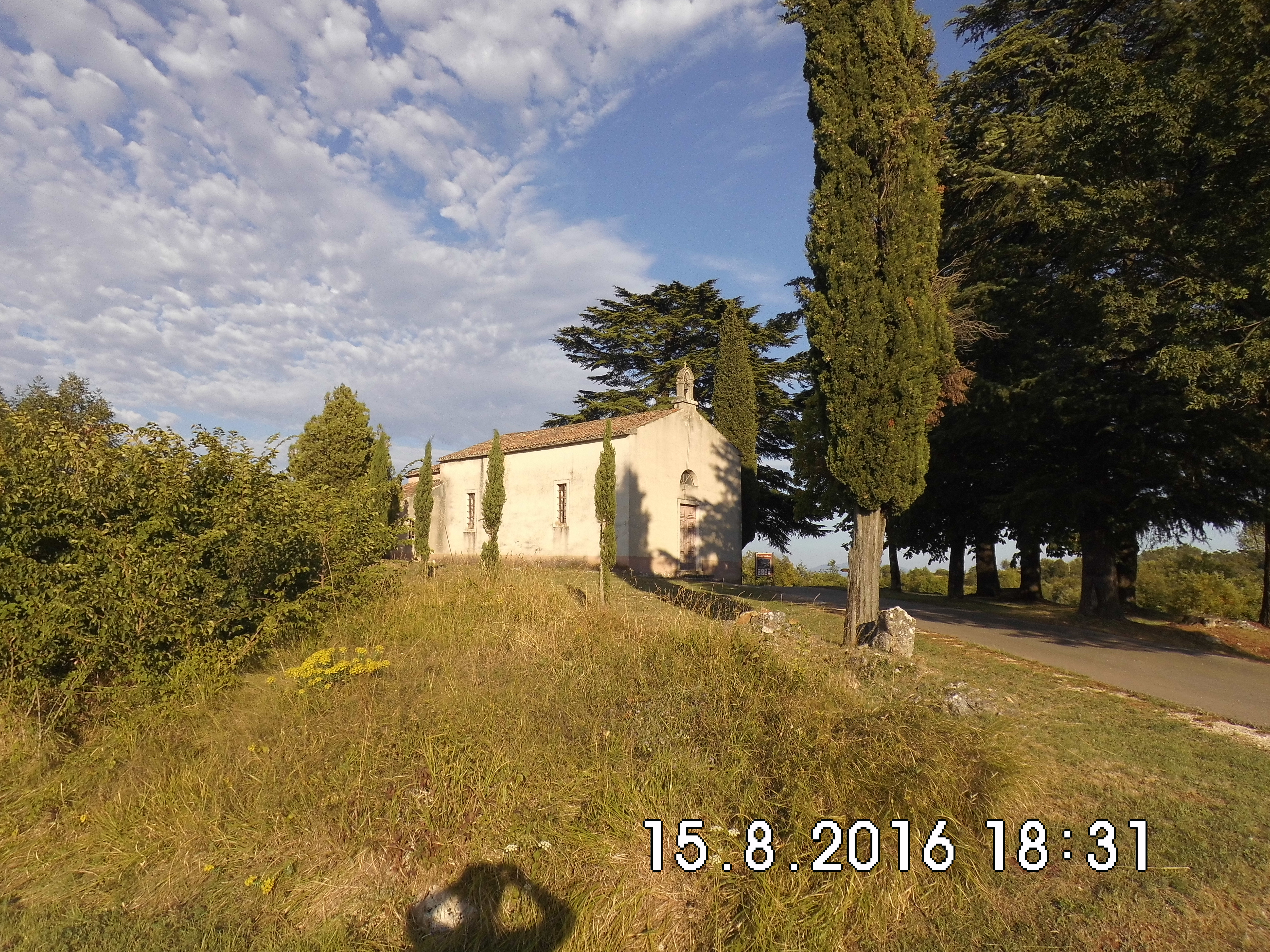 Die St. Hieronymuskirche in Stridone (ex Sdregna)